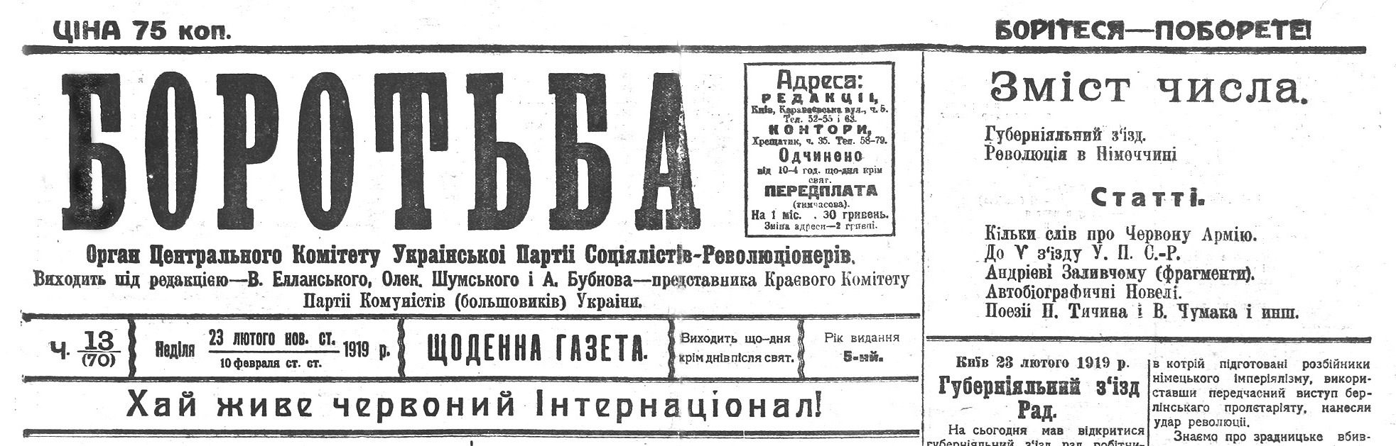 Газета «Боротьба» за 23 лютого 1919 року, де вперше були надруковані автобіографічні новели Андрія Заливчого.